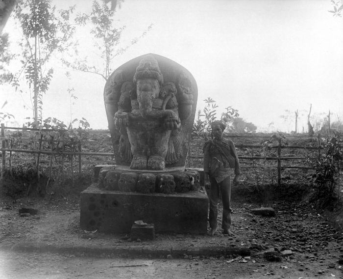 Negatief. Ganesha beeld bij Malang, Java. Ganesha beeld bij Soemberpoetjoeng (Malang)